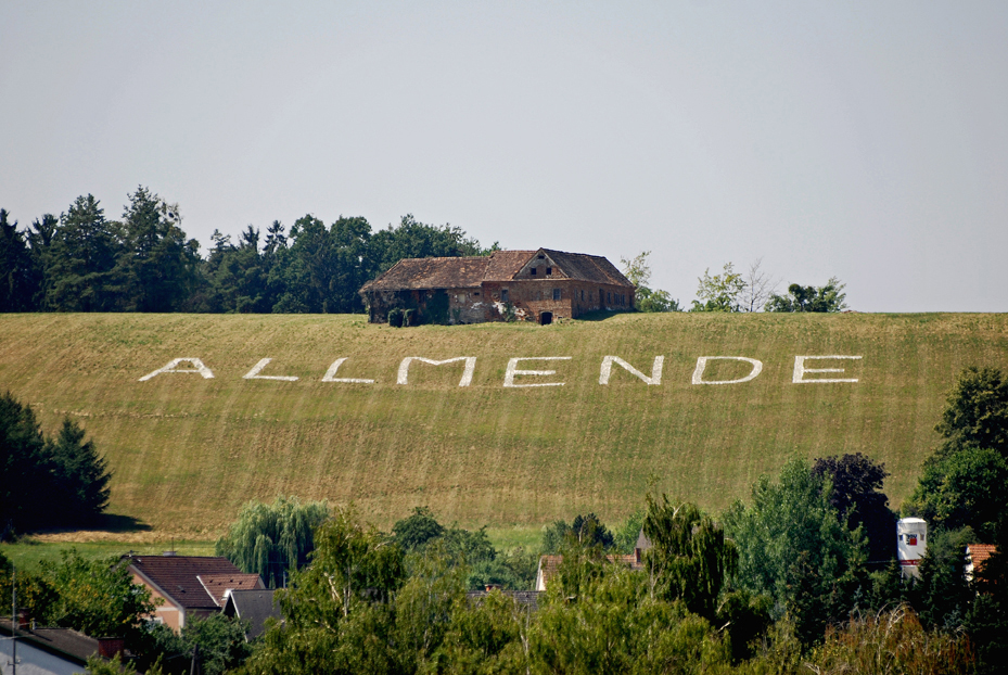 STADT.LAND.FLUSS.KUNST 2013